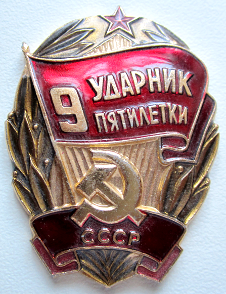 Ударник 9 пятилетки, общесоюзный знак